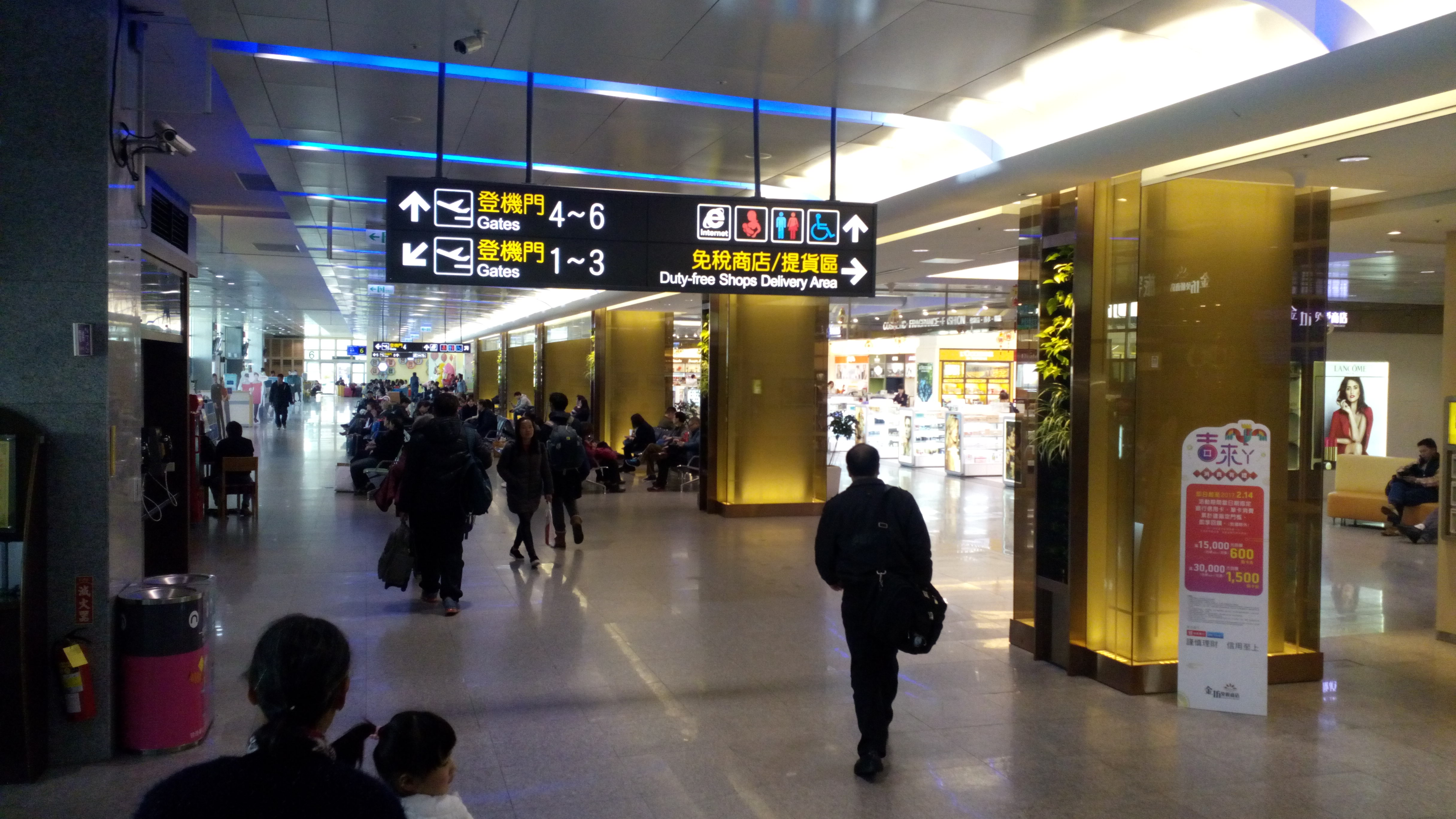 金門航站登機門及免稅商店區